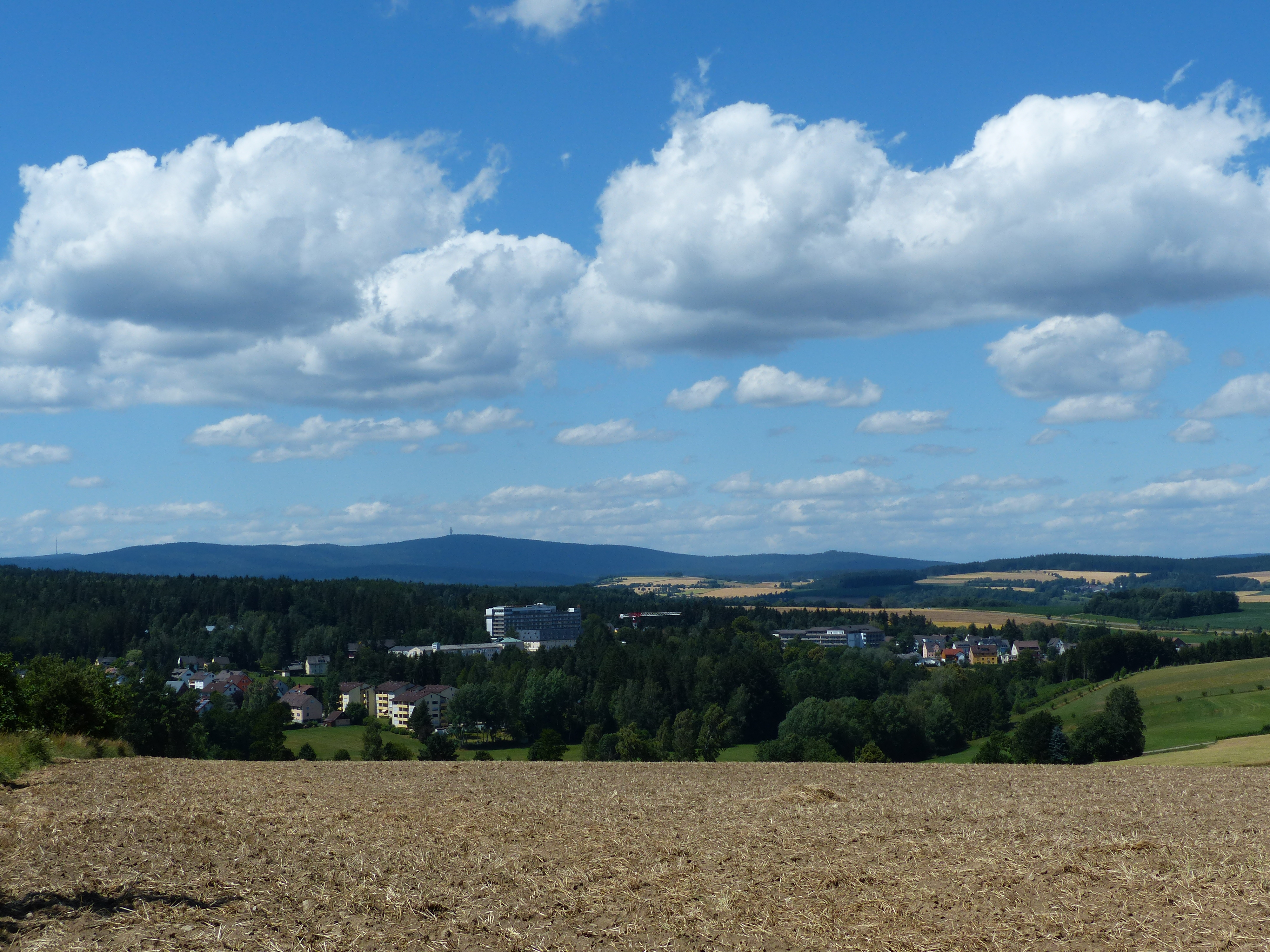 Ansicht von Bad Alexandersbad